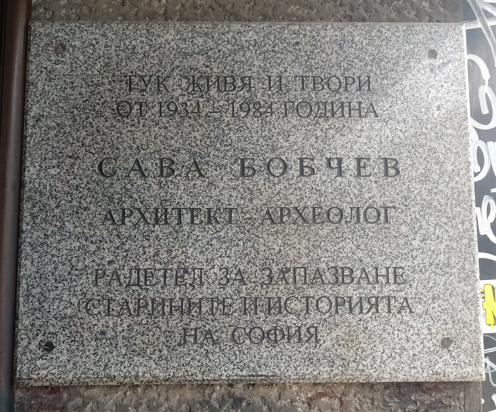 Sava Bobchev memorial plaque, 23 Patriarch Evtimiy Blvd., Sofia